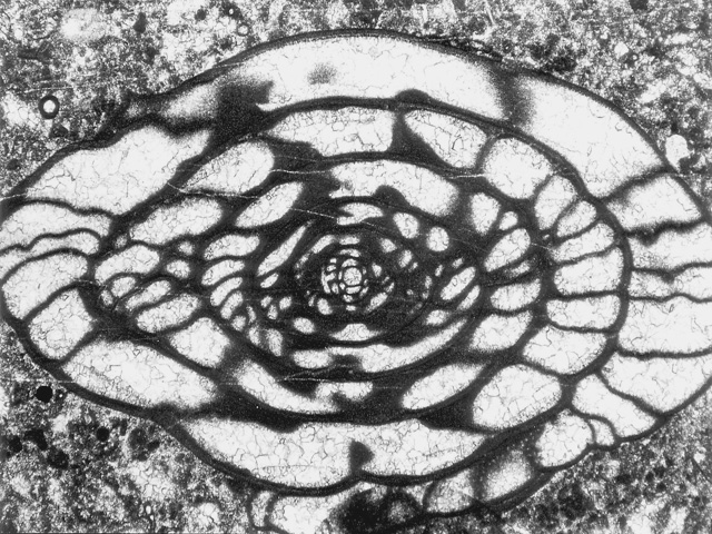 Fusulinid